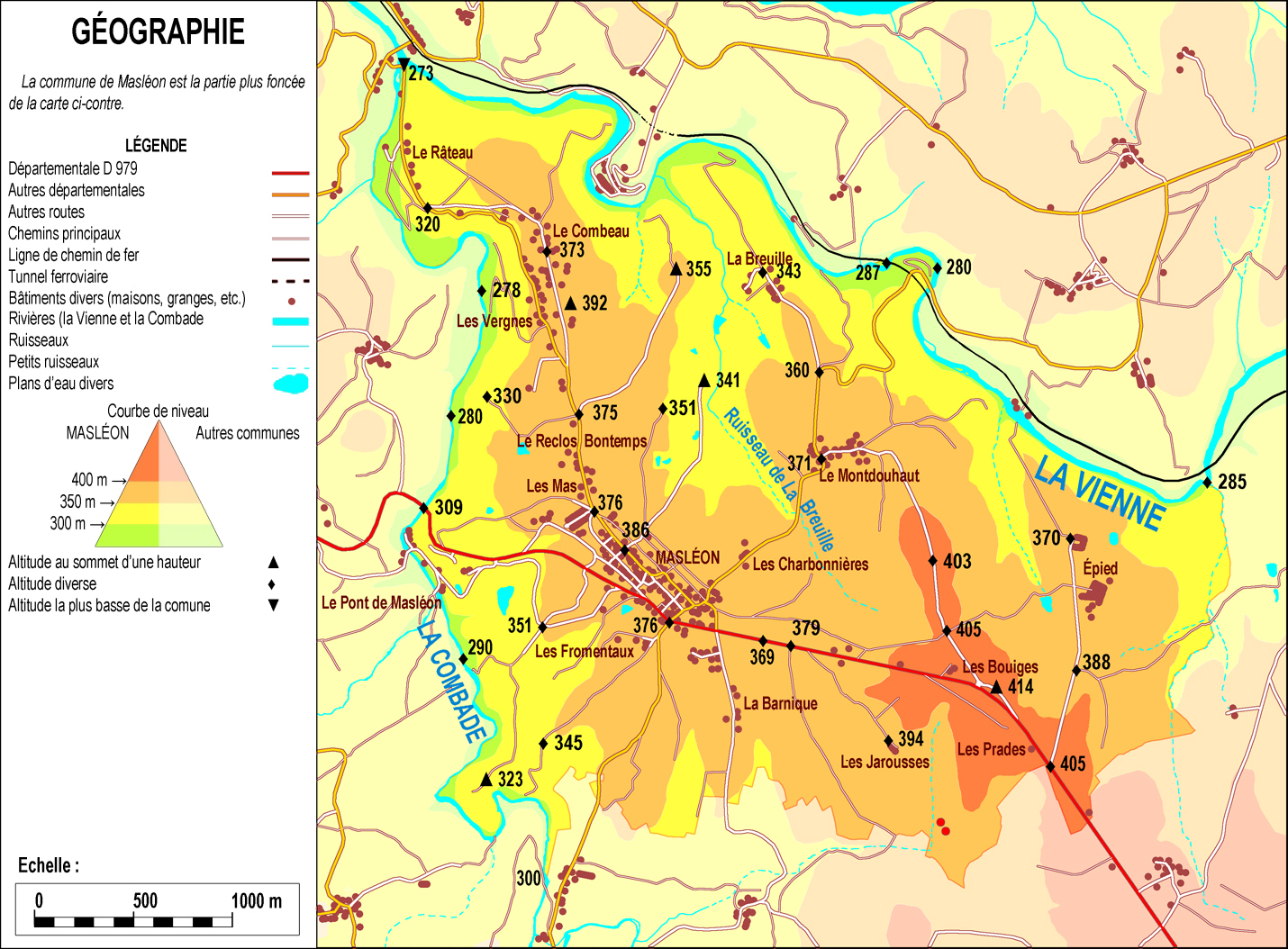 Carte géographique et hydrographique de Masléon